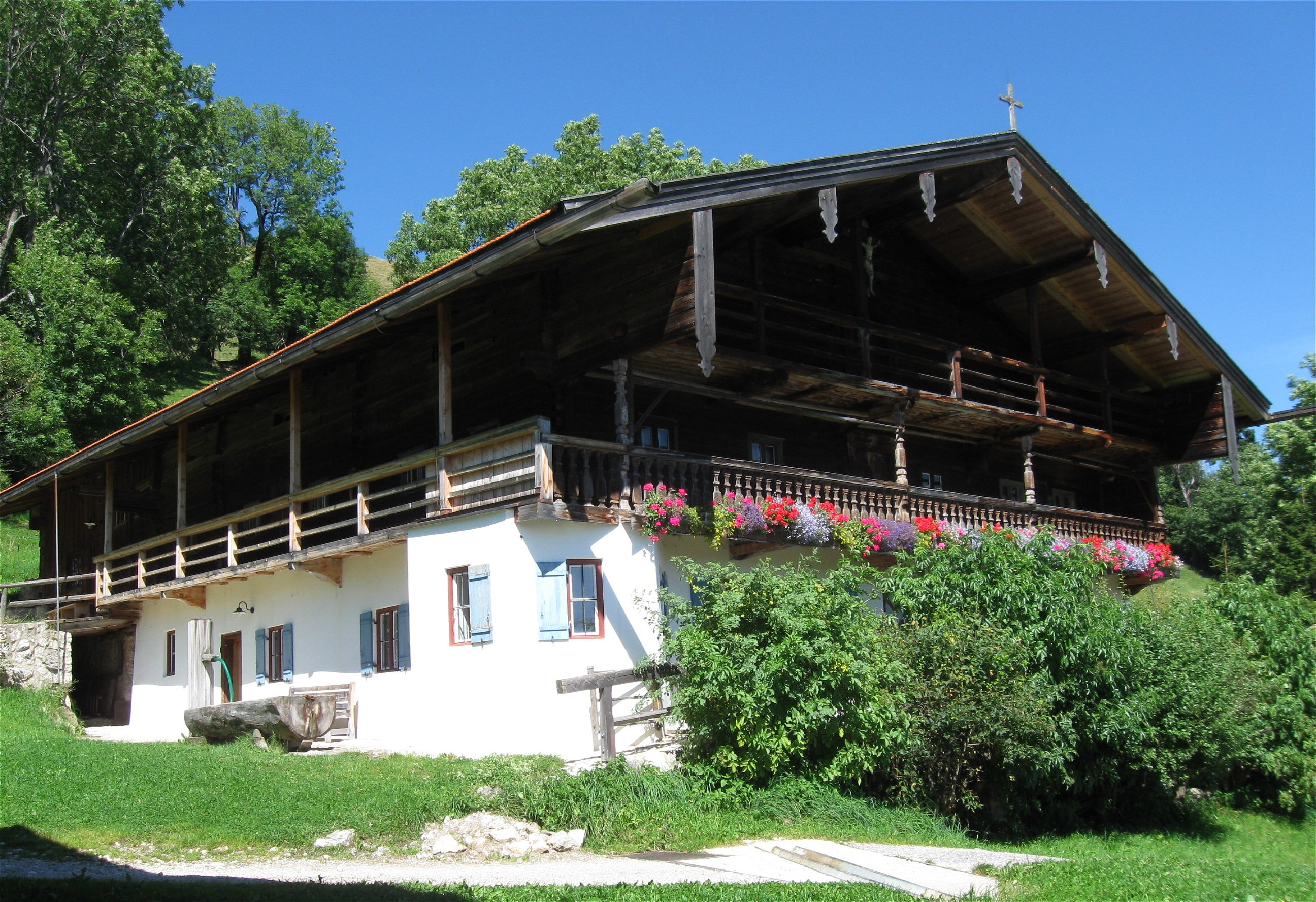 Asten 1. Bergbauernhaus, Einfirsthof, "Vorderasten", zweigeschossiger Flachsatteldachbau mit Eckerker, Blockbauobergeschoss, Laube und Hochlaube, im Kern wohl 16. Jh., Lauben noch 18. Jh. und erneuert, Sterntür bez. 1841, im Giebelgeschoss Hauskapelle; mit Ausstattung; im Giebelfeld Kruzifix, wohl 17. Jh.